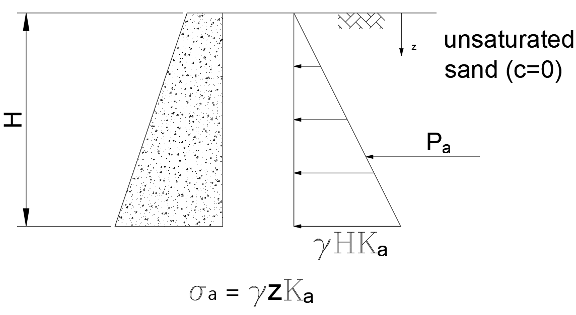 비포화 모래지반 토압분포